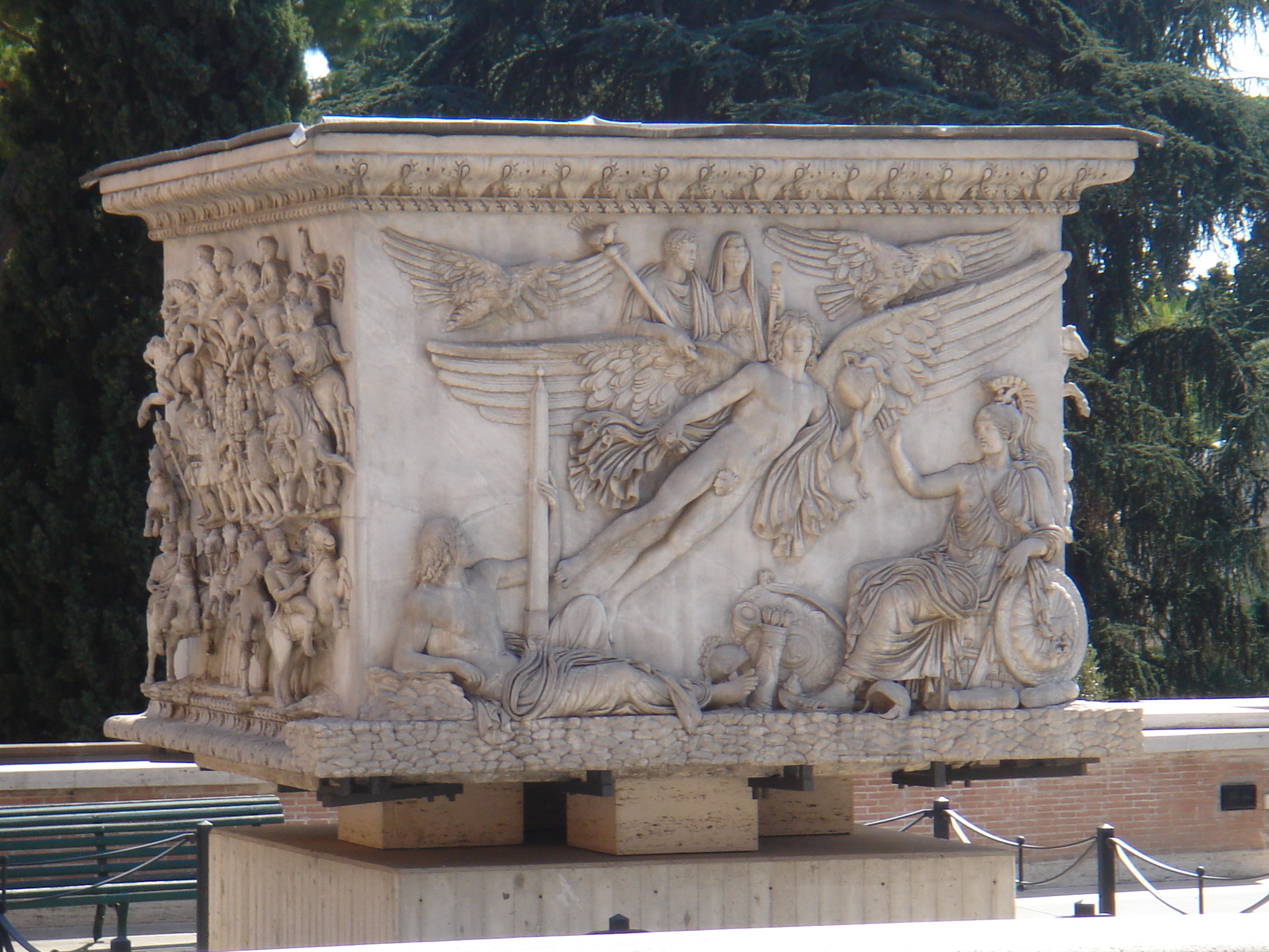 Roma, giardini dei Musei vaticani, base della Colonna Antonina dal Campo Marzio: il genio alato porta tra gli dei Antonino Pio e Annia Faustina divinizzati; a sinistra, il genio del Campo Marzio, con l'obelisco di Augusto; a destra, la dea Roma.